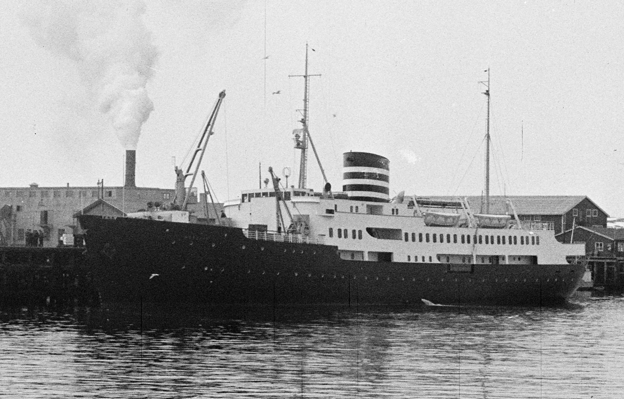 Bildet er hentet fra Arkivverket. Vårfiske på Vardø Arkivinstitusjon : Riksarkivet Arkivnavn : Billedbladet NÅ Sted : Norge, Finnmark, Vardø, Vardø Emneord: Industri, Arbeid, Fiskeindustri Avbildet